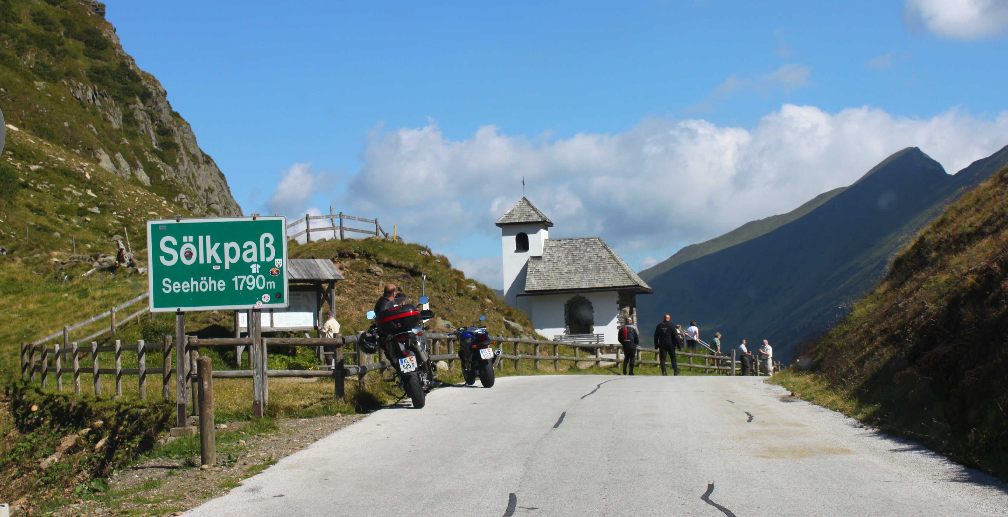 Der Sölkpass ist ein Gebirgspass über die Niederen Tauern. Er liegt an der Scheide zwischen Wölzer- und Schladminger Tauern und verbindet über die Erzherzog-Johann-Straße das Murtal mit dem Ennstal